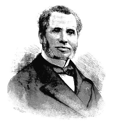 "M. Jolibois".